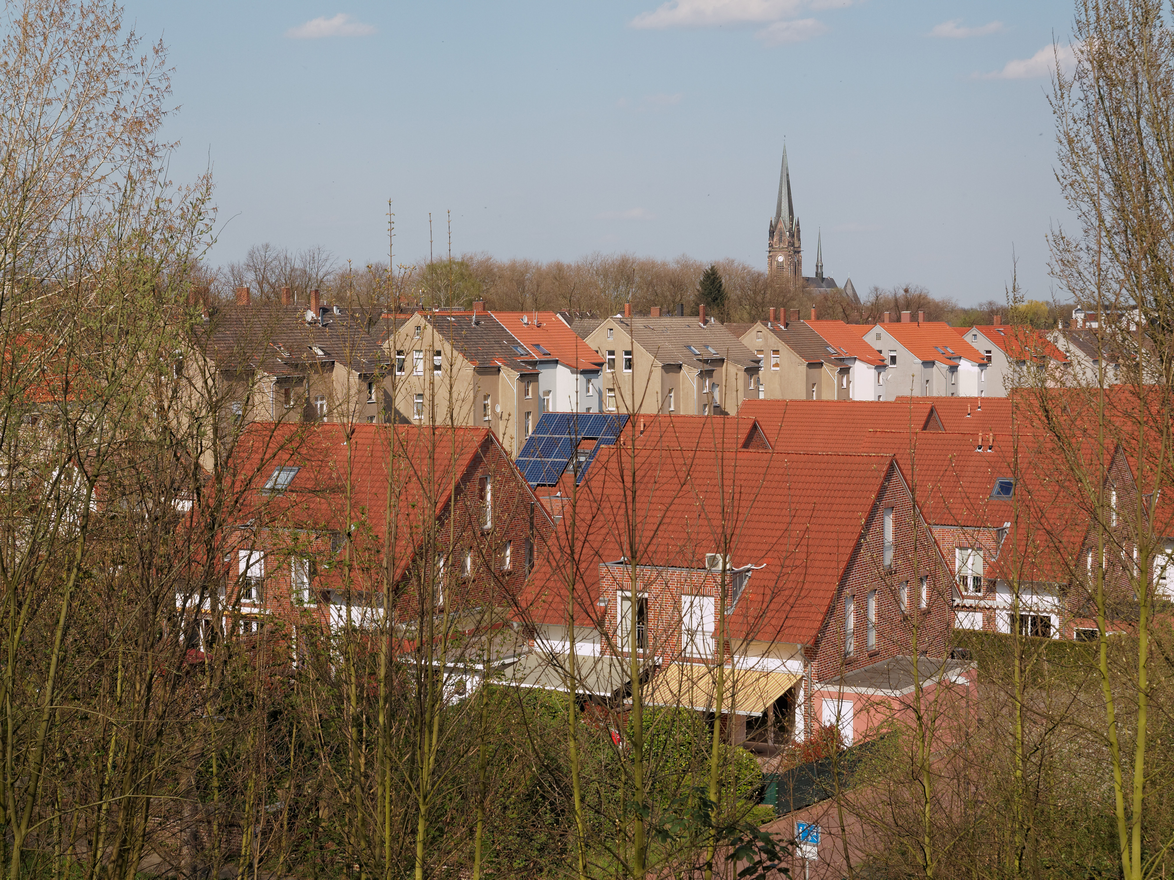 Recklighausen, Suderwicher Alm, Bergehalde der ehemaligen Zeche König-Ludwig 4/5 im Ortsteil Suderwich, Ausblick auf Suderwich mit dem Kirchturm von St. Johannes